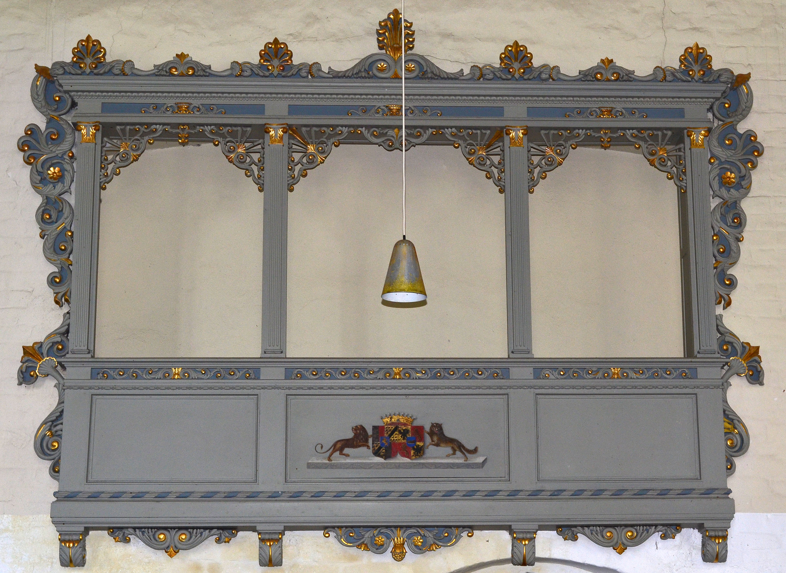 Damshagen, St. Thomas- Kirche, Patronatsloge 2; arms of allaince of Kuno zu Rantzau-Breitenburg and his wife, the heiress Amalasuntha Bothmer (1810-1856)